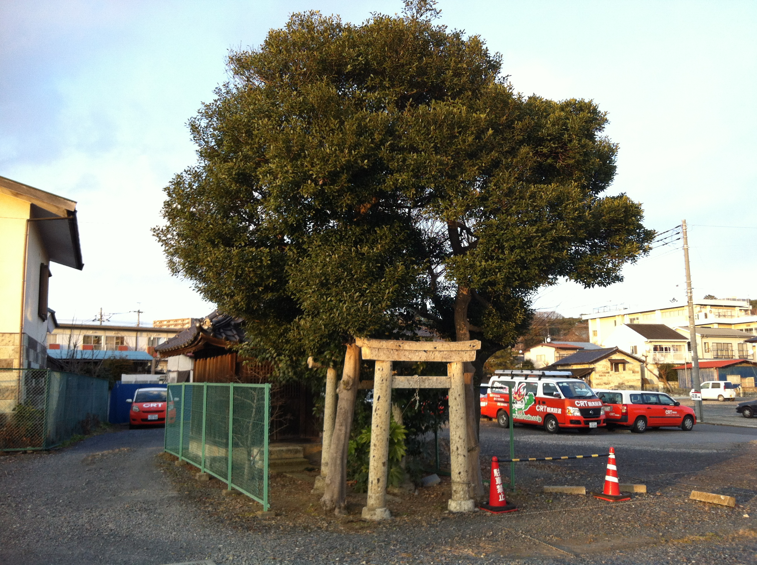 江戸時代建造の中村氏館跡に残る中村神社。2017年現在は栃木放送駐車場の一部になっている。